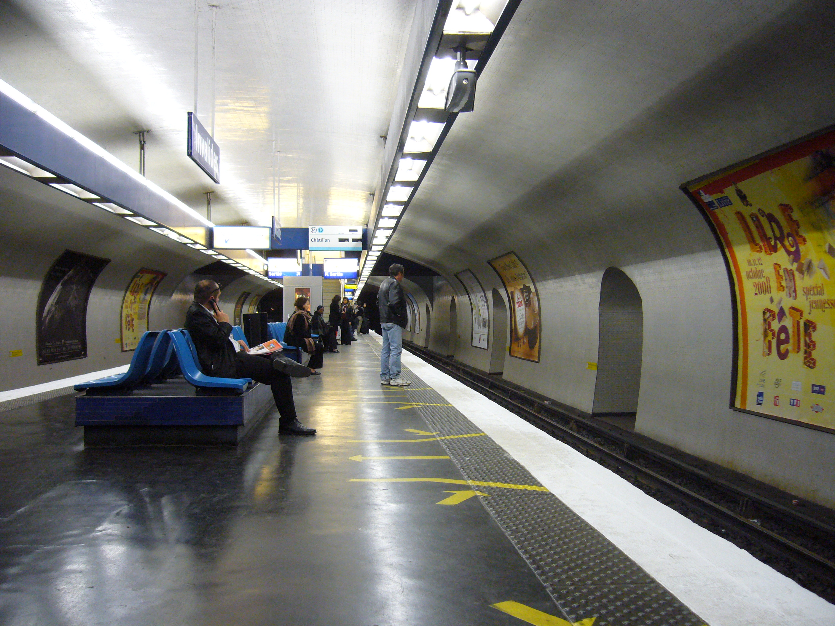 Vue de la station Invalides sur la ligne 13 du métro de Paris.